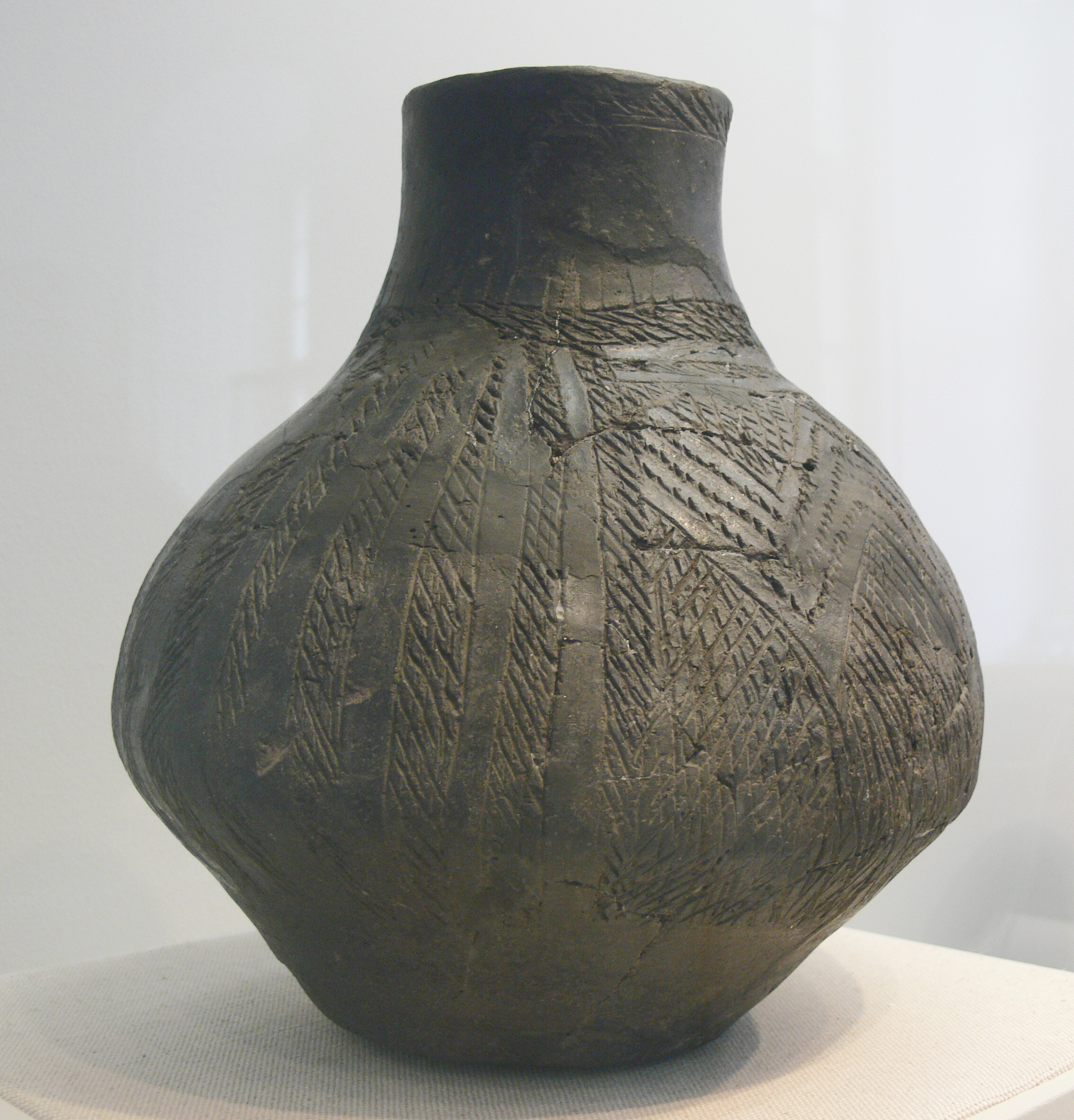 Keramik der Schussenrieder Kultur, 4. Jahrtausend v. Chr. (Bodman (Bodensee) oder Schussenried, Oberschwaben) Collection: Museum für Vor- und Frühgeschichte Berlin